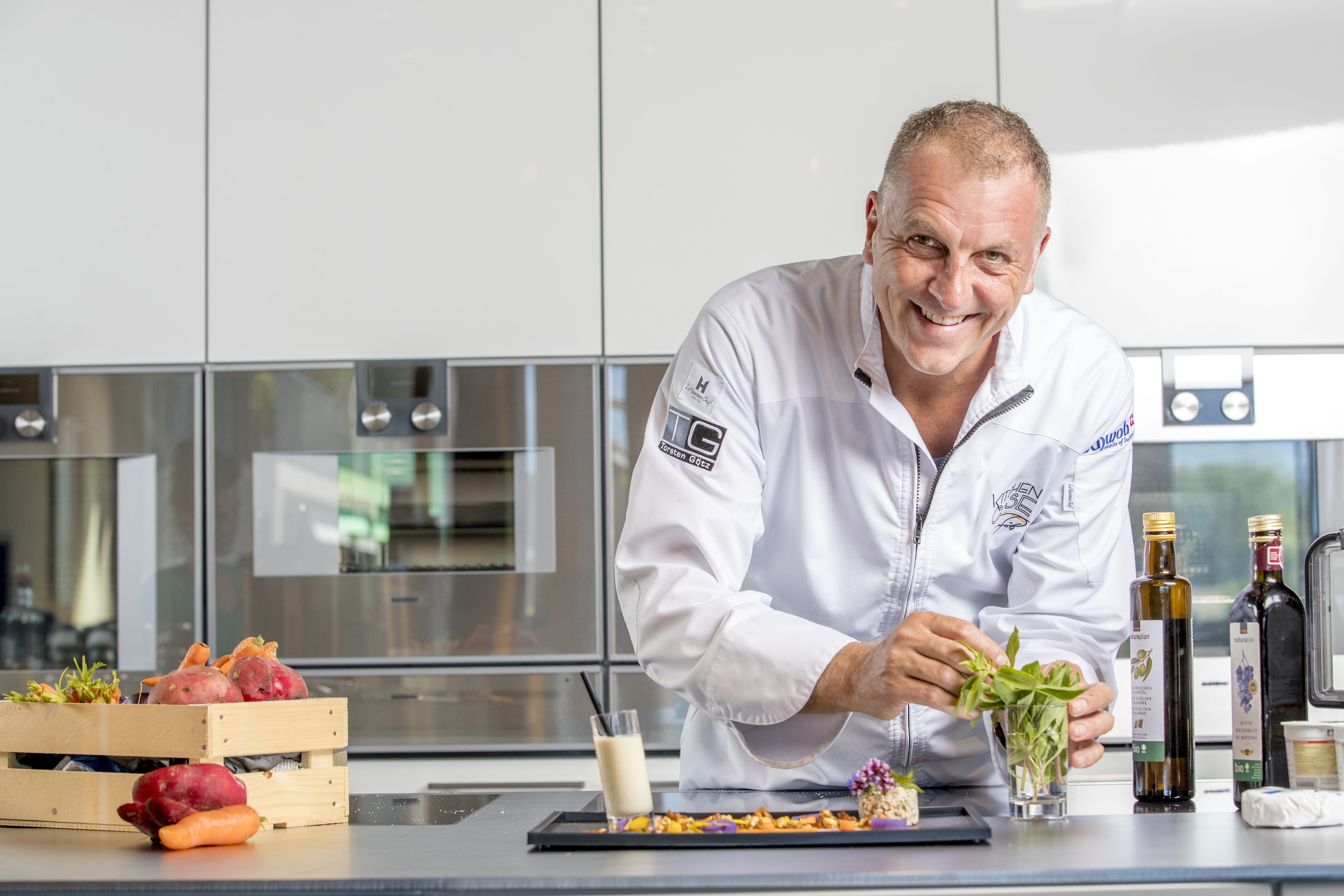 Torsten Götz bei der Zubereitung von Speisen in seiner Kulinarischen Genusswerkstatt in Unterseen